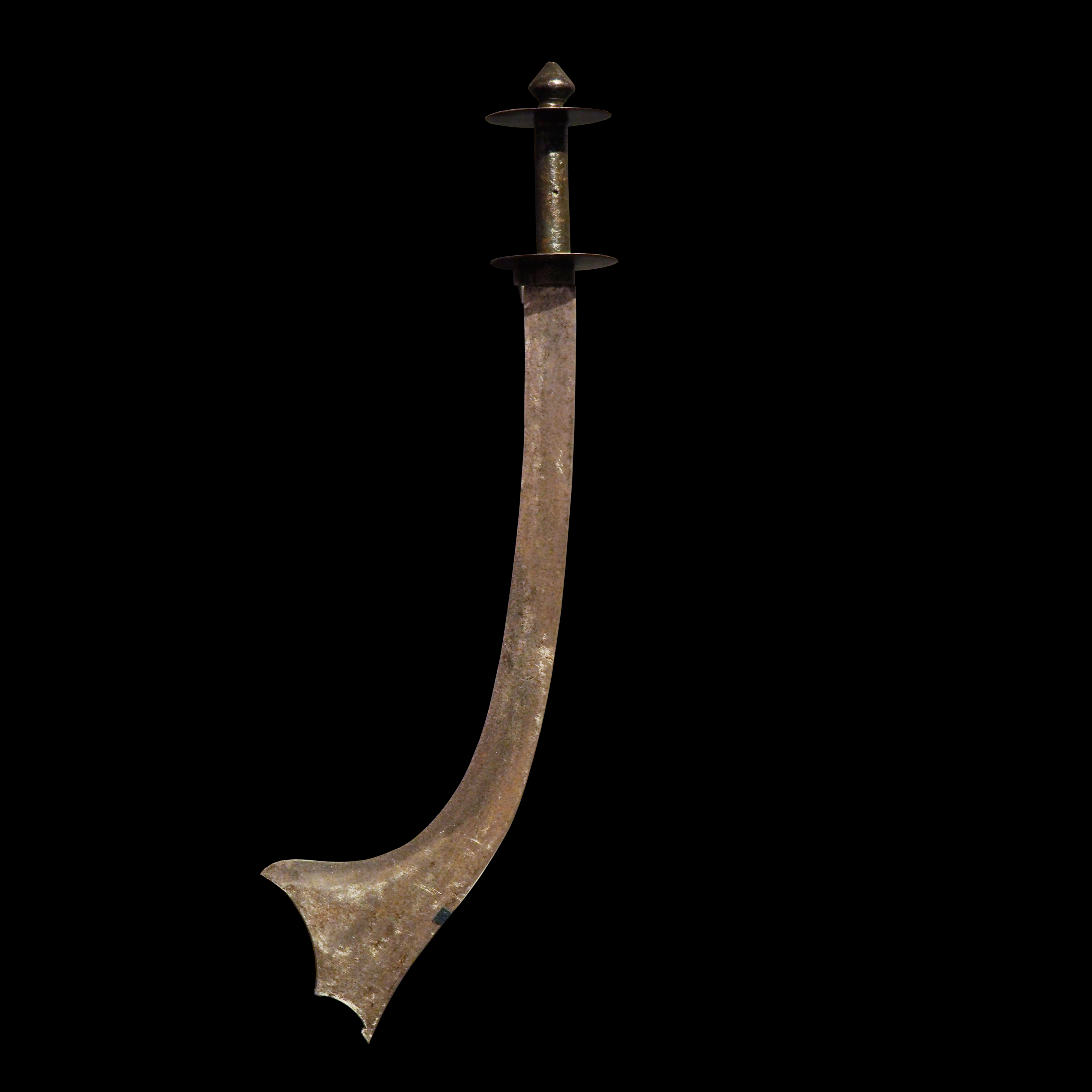 Khora sabre, Nepal, circa 1900. Musée de Morges, Inv. 1010604